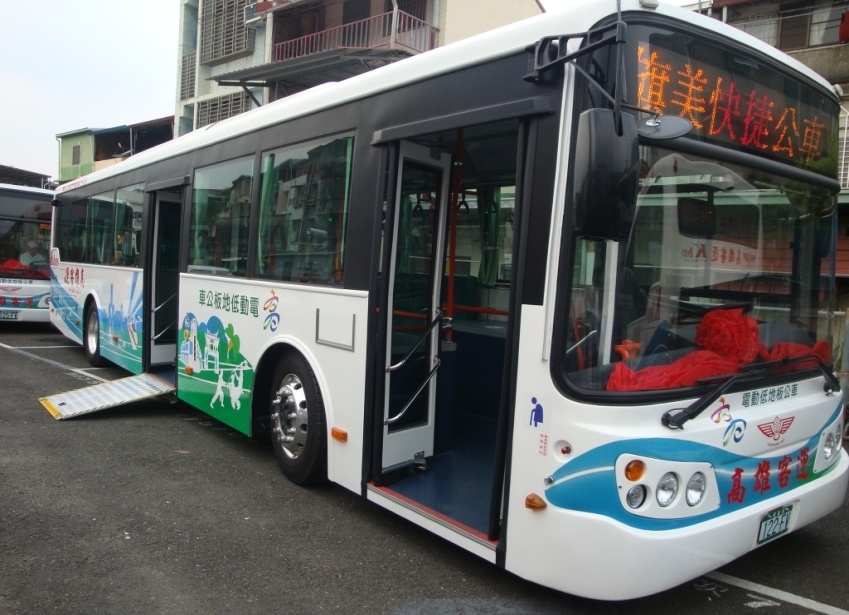 高雄客運華德動能科技RAC12LB150電動低地板公車122-FV，行駛高雄市公車旗美國道快捷。